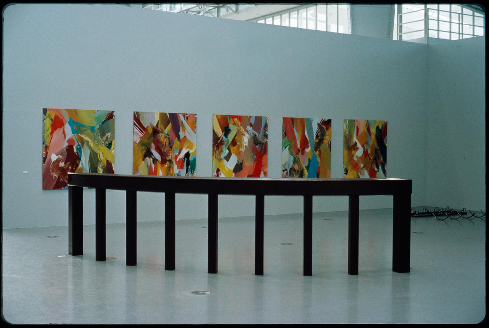 Ausstellung "Kunst, Europa, Deichtorhallen, 1991